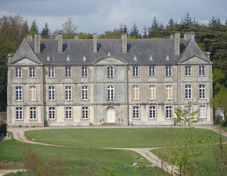 Photo aérienne de la façade du château de Loyat